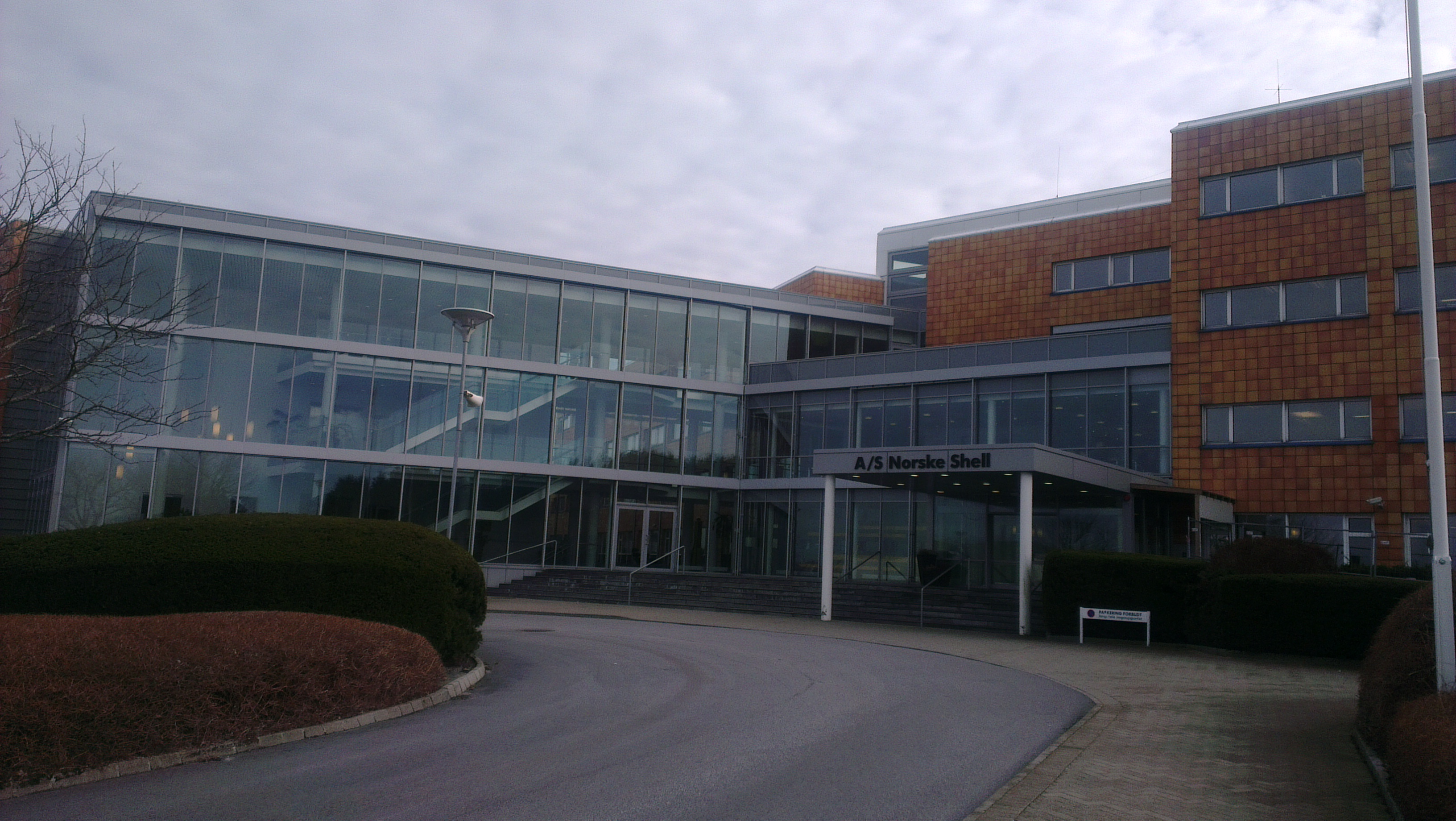 Hovedkontoret til AS Norske Shell i Tankveien 1, Tananger